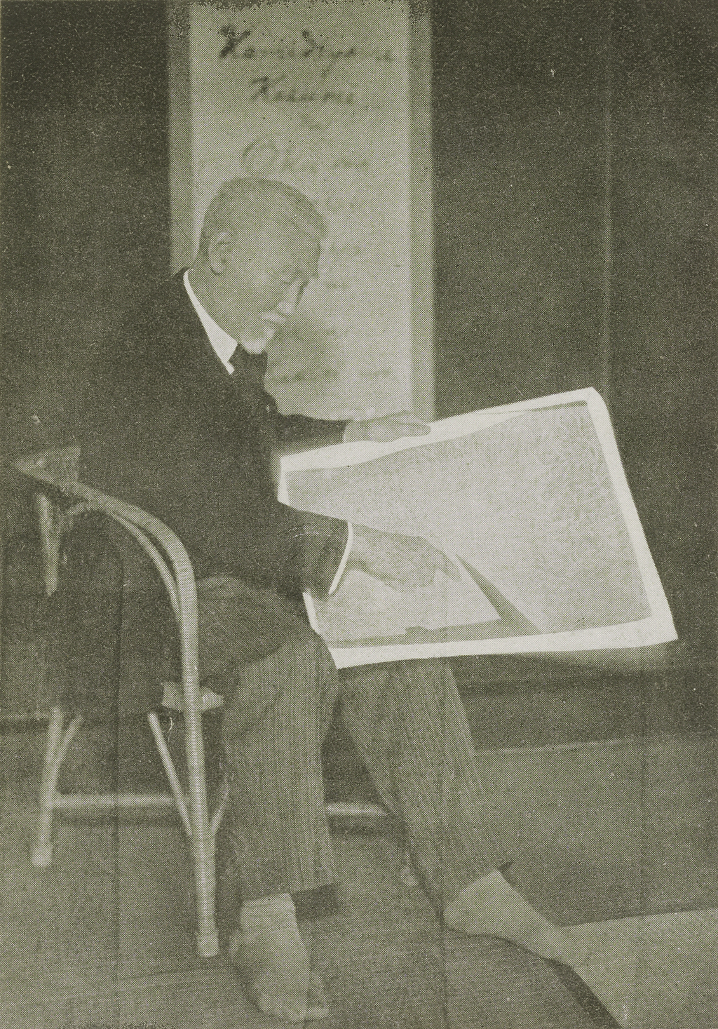 Portrait of Tanakadate Aikitsu (田中館愛橘, 1856 – 1952)